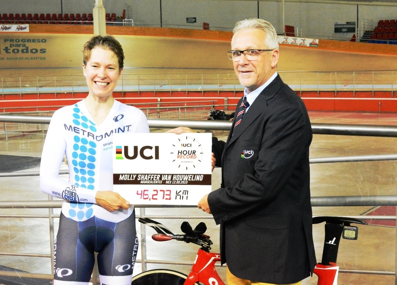 Molly Shaffer Van Houweling, Stundenweltrekord im Velodromo Bicentenario in Aguascalientes, Mexiko